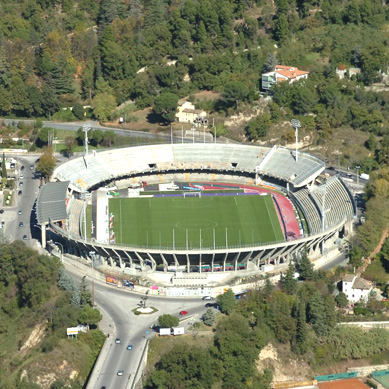 stadio